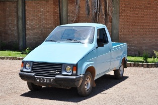 Voiture KARENJY FAOKA - Madagascar